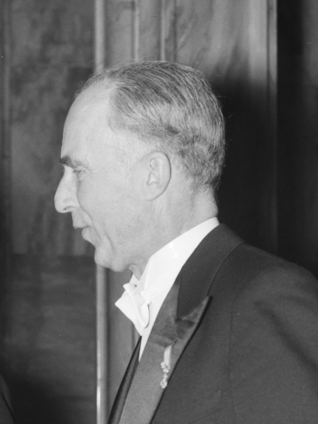 Rector magnificus prof. mr. J. van Rijpperda Wierdsma tijdens receptie na diesviering van de Leidse Universiteit, 8 febr. 1961